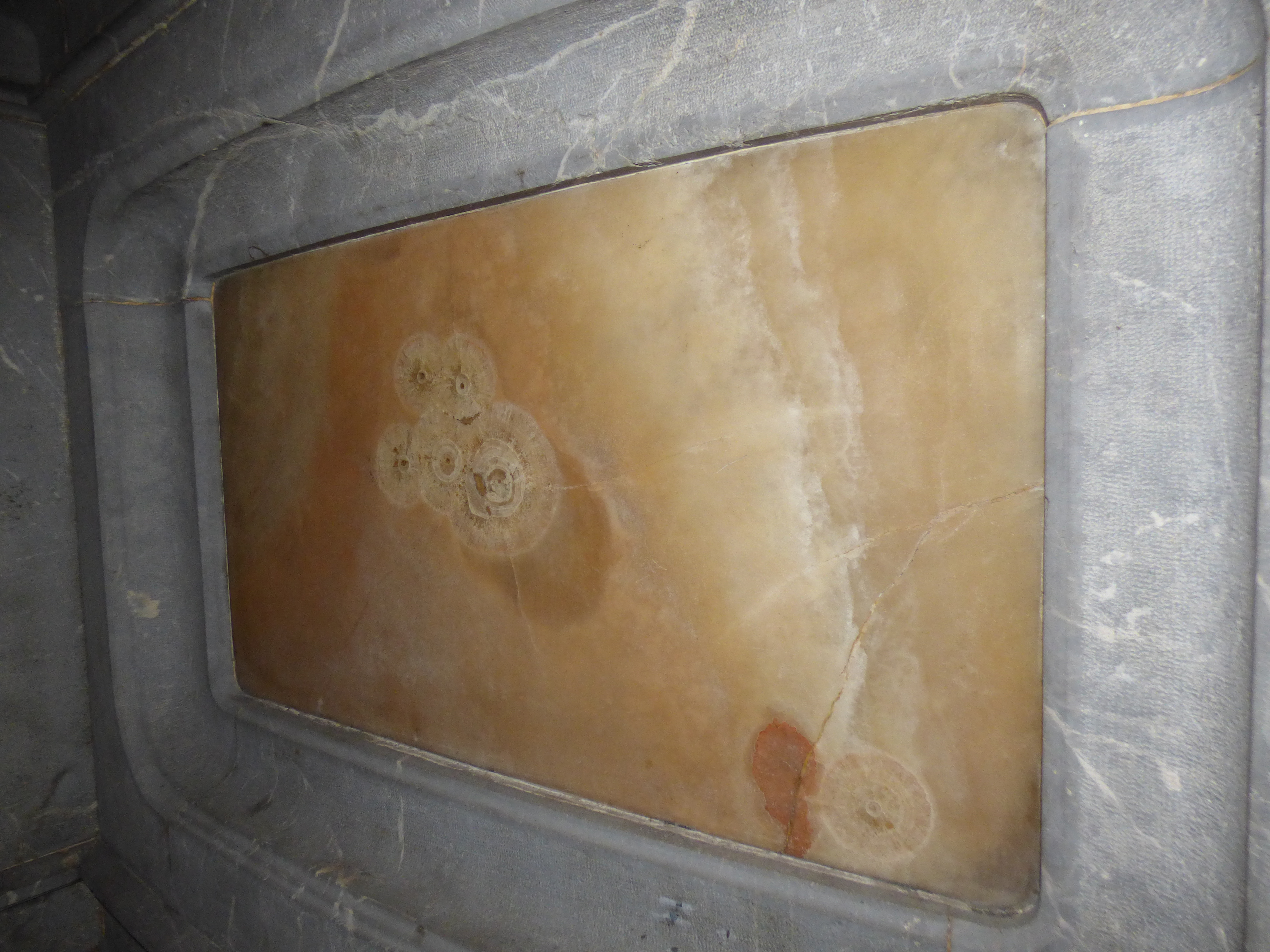 Impactos de bala en el retablo del altar mayor, al lado del Evangelio, de la Basílica del Sagrado Corazón de Gijón.